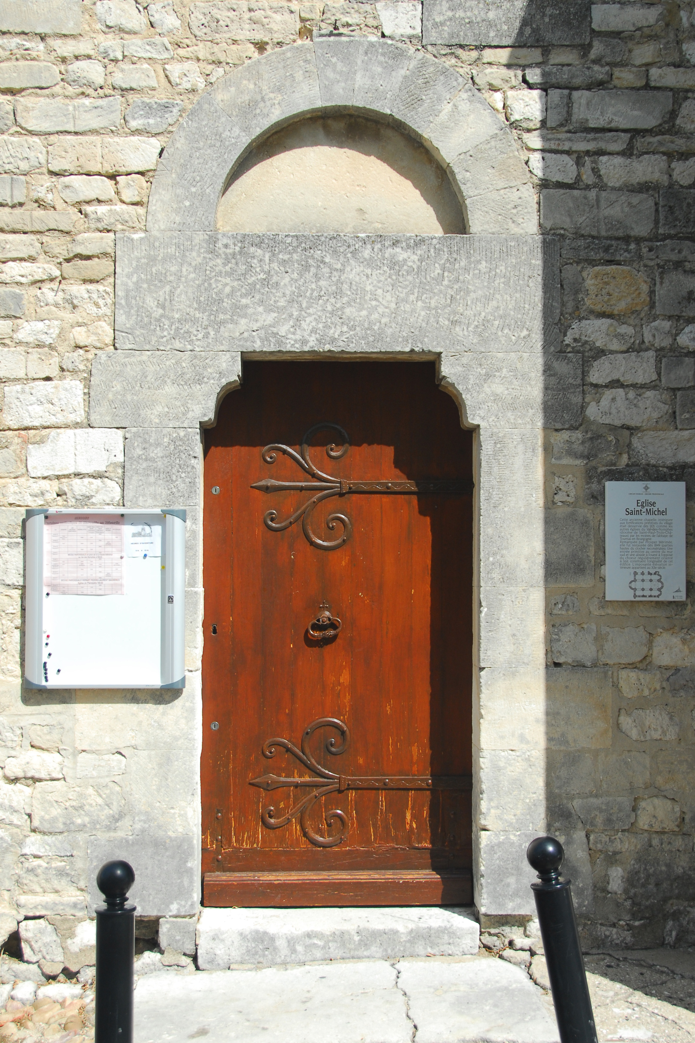 St-Michel de La Garde- Adhémar. südl.Seitenportal